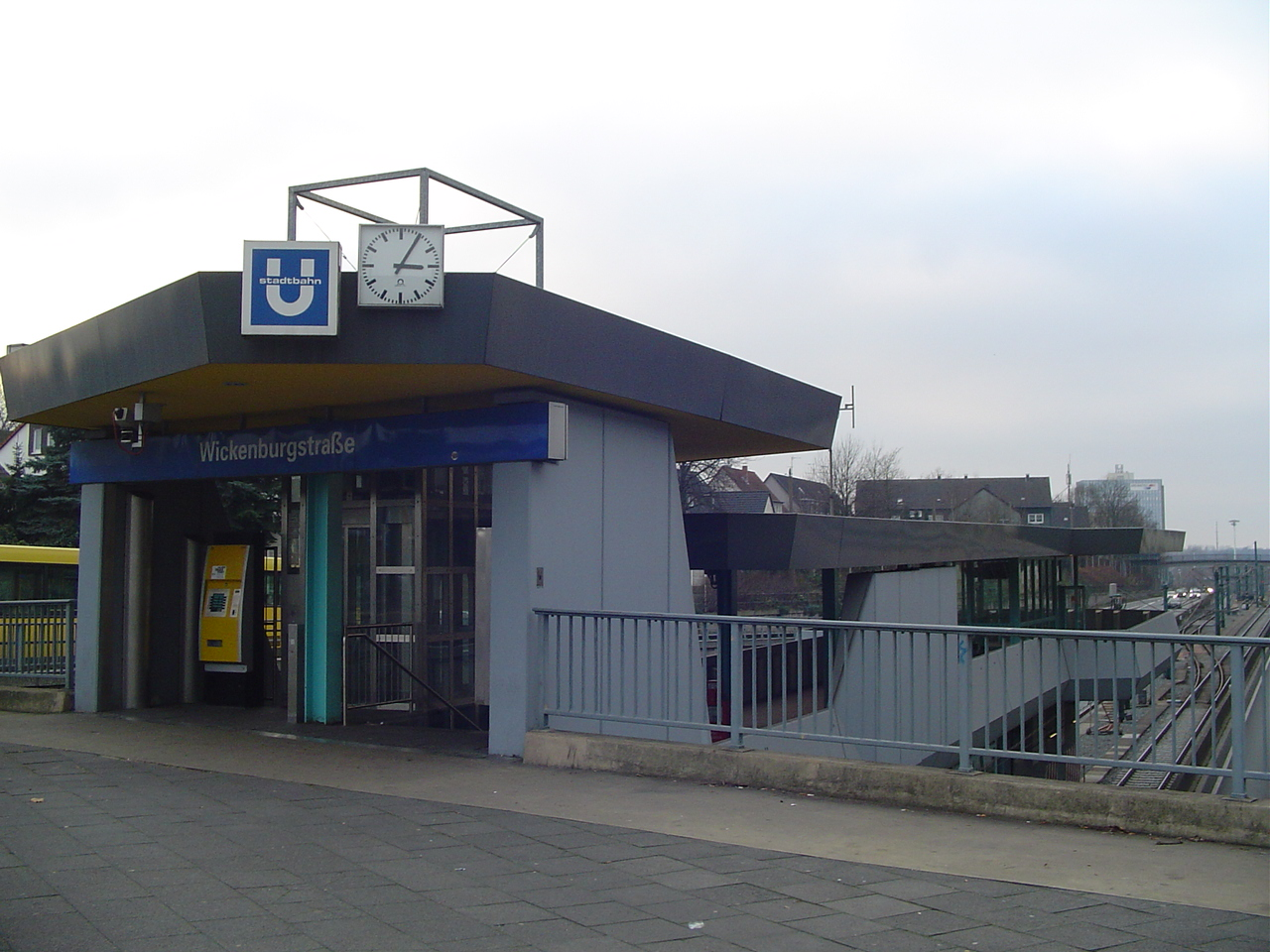 Essen Stadtbahn, U-Bhf Wickenburgstraße